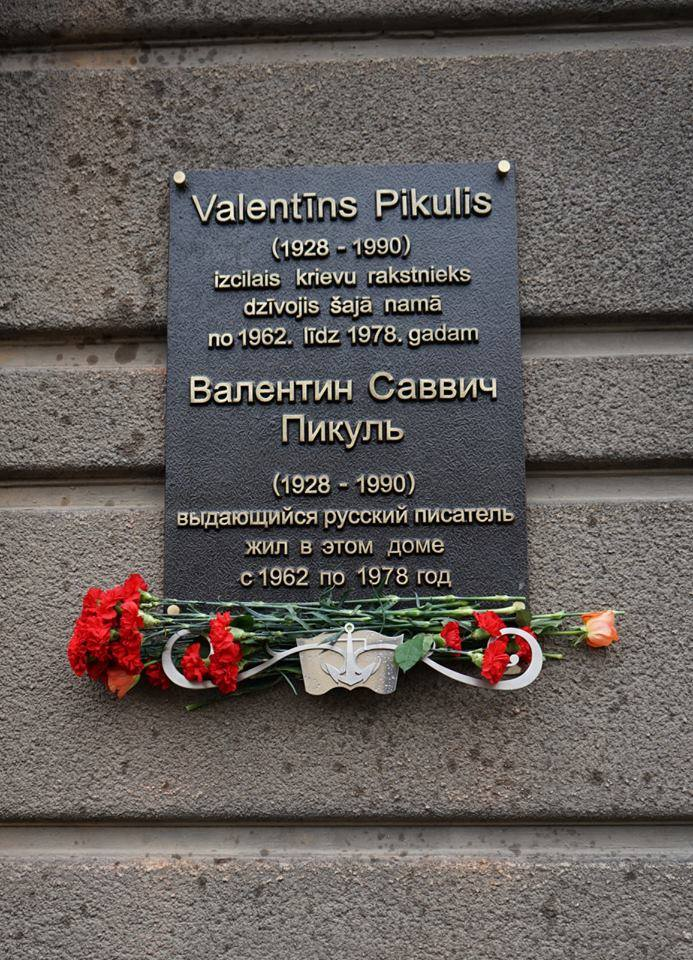 Мемориальная доска на доме на ул. Тербатас в Риге, где с 1962 по 1978 год жил и работал русский советский писатель-историк Валентин Саввич Пикуль.